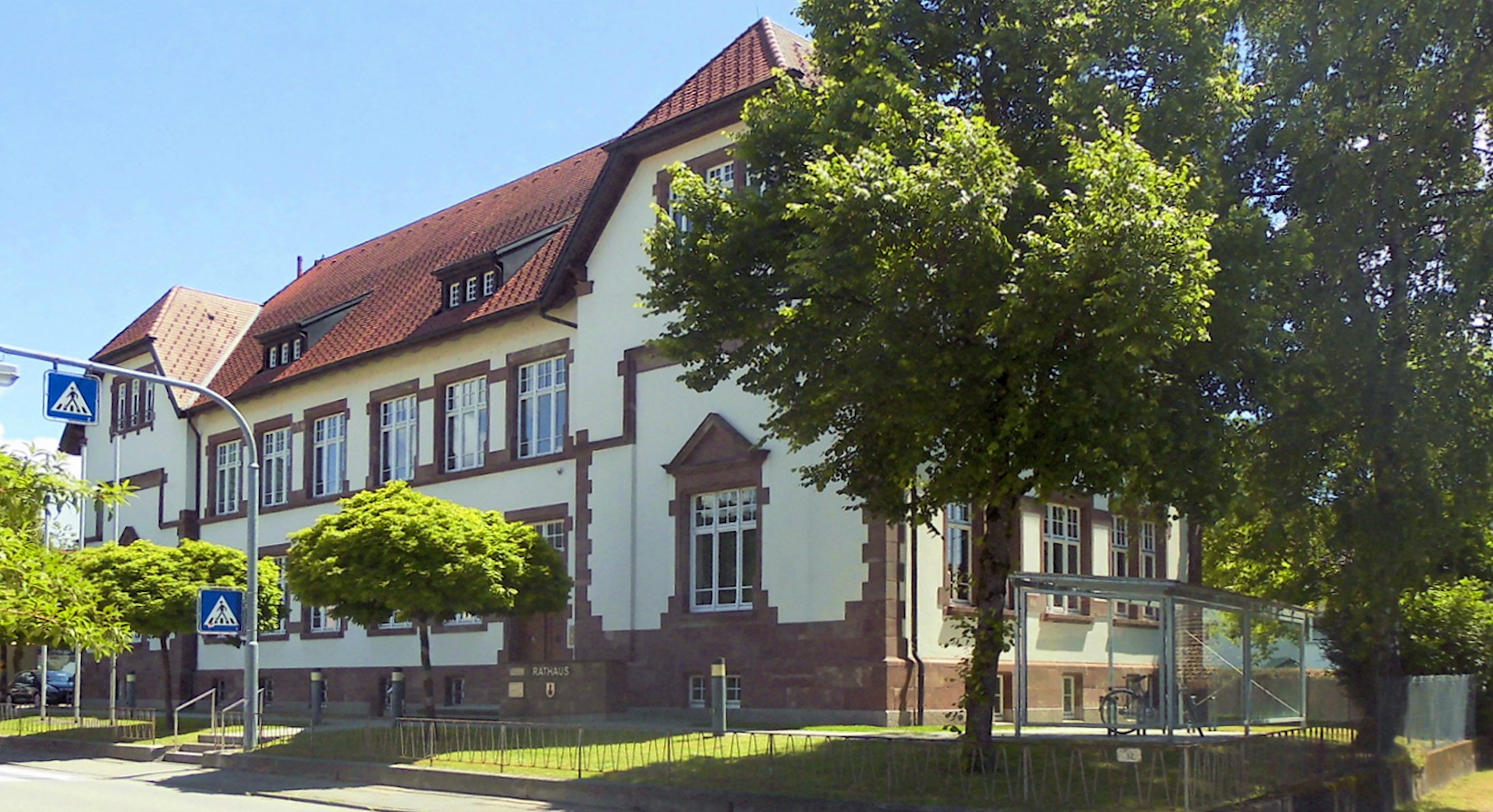 Rathaus der Gemeinde Maulburg, Baden-Württemberg. Das Rathaus beherbegt auch das Hermann-Burte-Archiv.